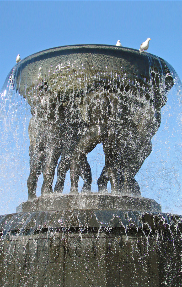 La vasque de la fontaine dans le parc Vigeland. Gustav Vigeland (Mandal, 11 avril 1869 - Kirkeveien, 12 mars 1943) est un sculpteur norvégien. Sa principale réalisation se trouve au Frognerpark, le plus grand parc d'Oslo, où sont exposées 214 de ses œuvres. extrait de Wikipedia en français Photo Annie Dalbéra